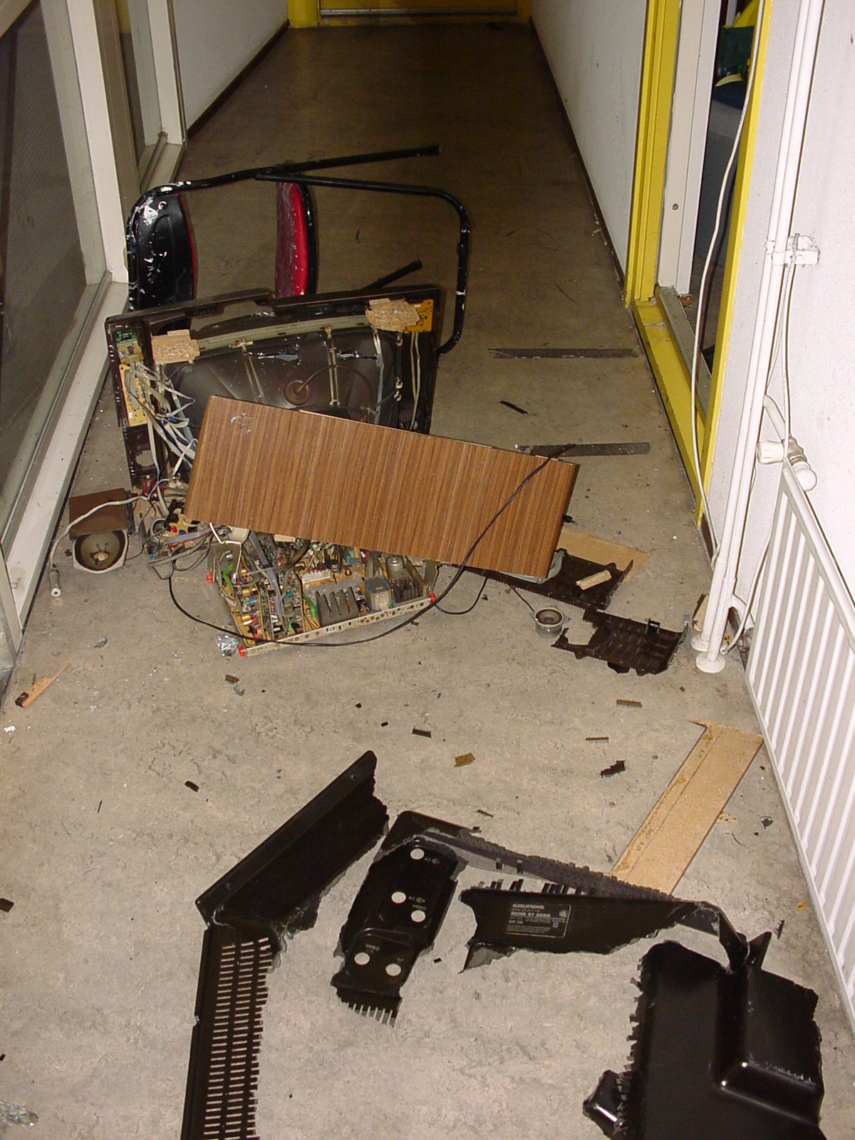 Kapotte televisie door verkeerd gebruik (als bowlingbal)